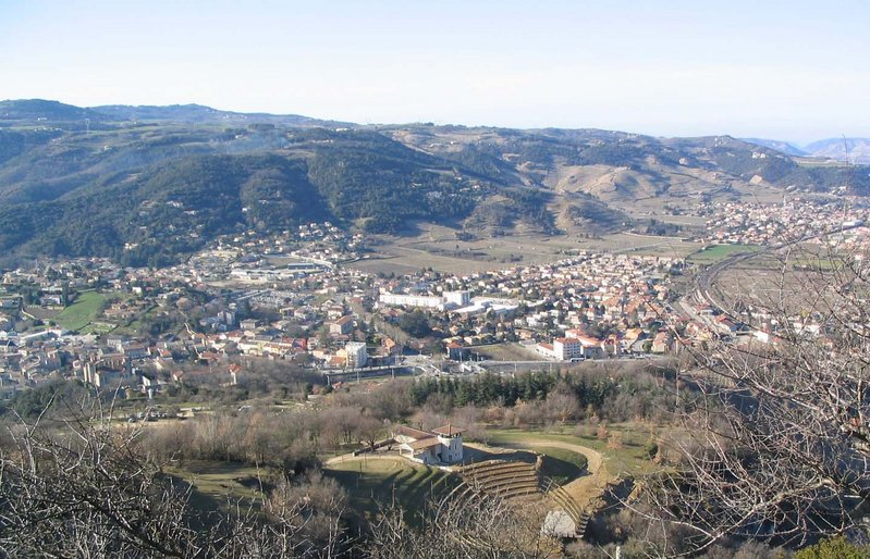 Ville de Saint Péray, vue depuis le chateau de Crussol Photo personnelle prise en mars 2004